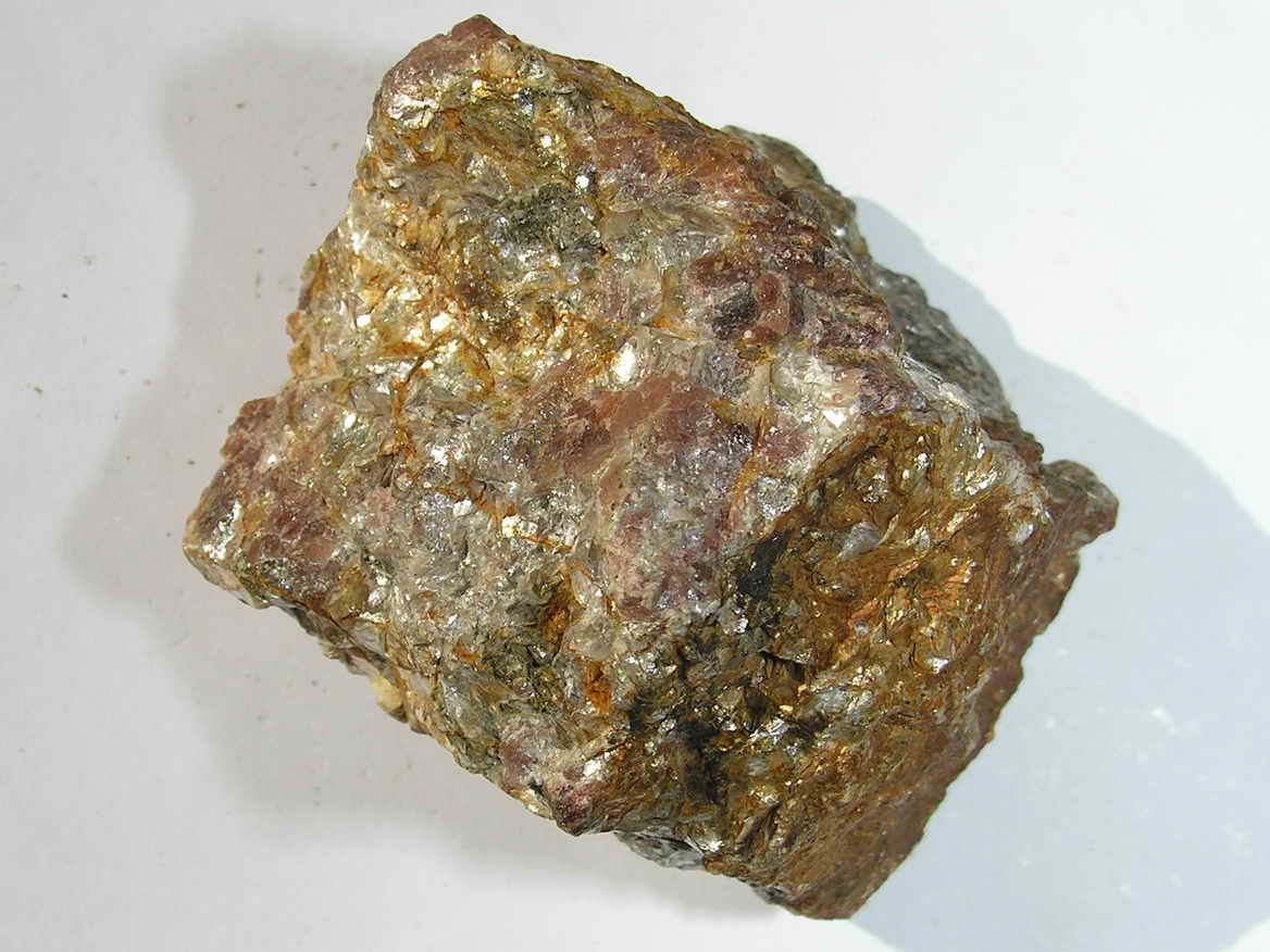 Granate